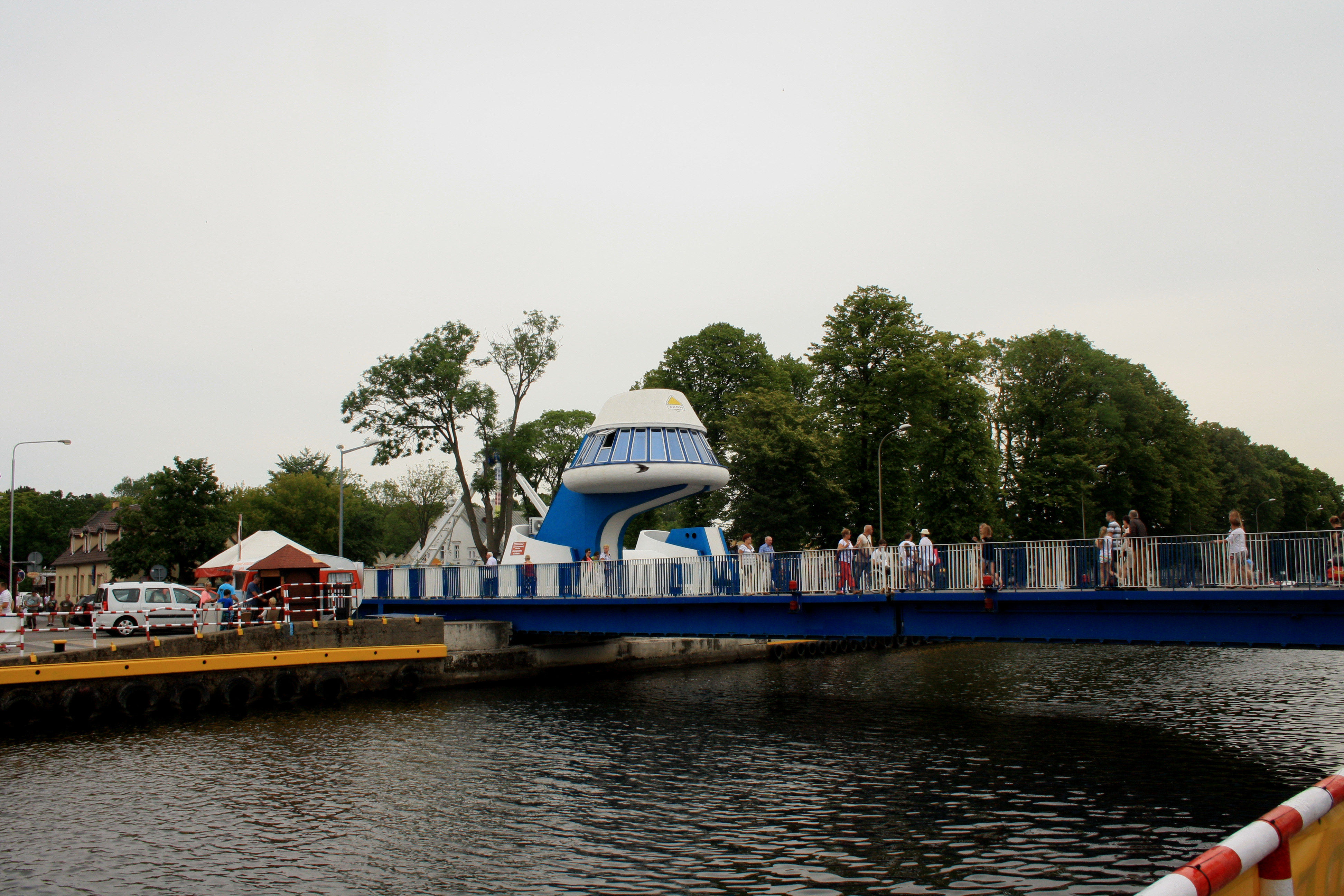 Most rozsuwany w Darłówku